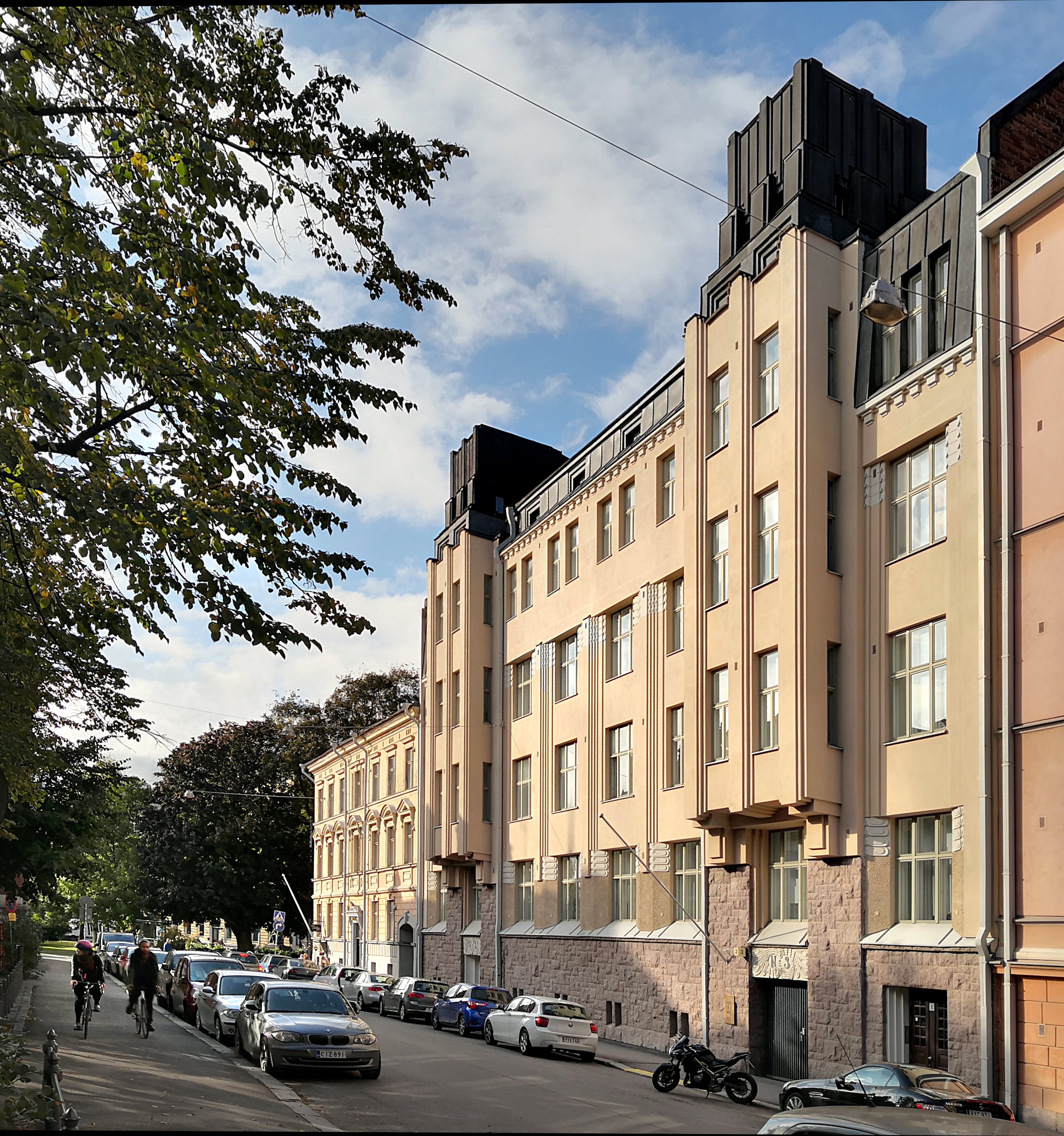 Ullanlinnankatu 3-5 This is a rephotograph of a monument in Finland. Original photo is